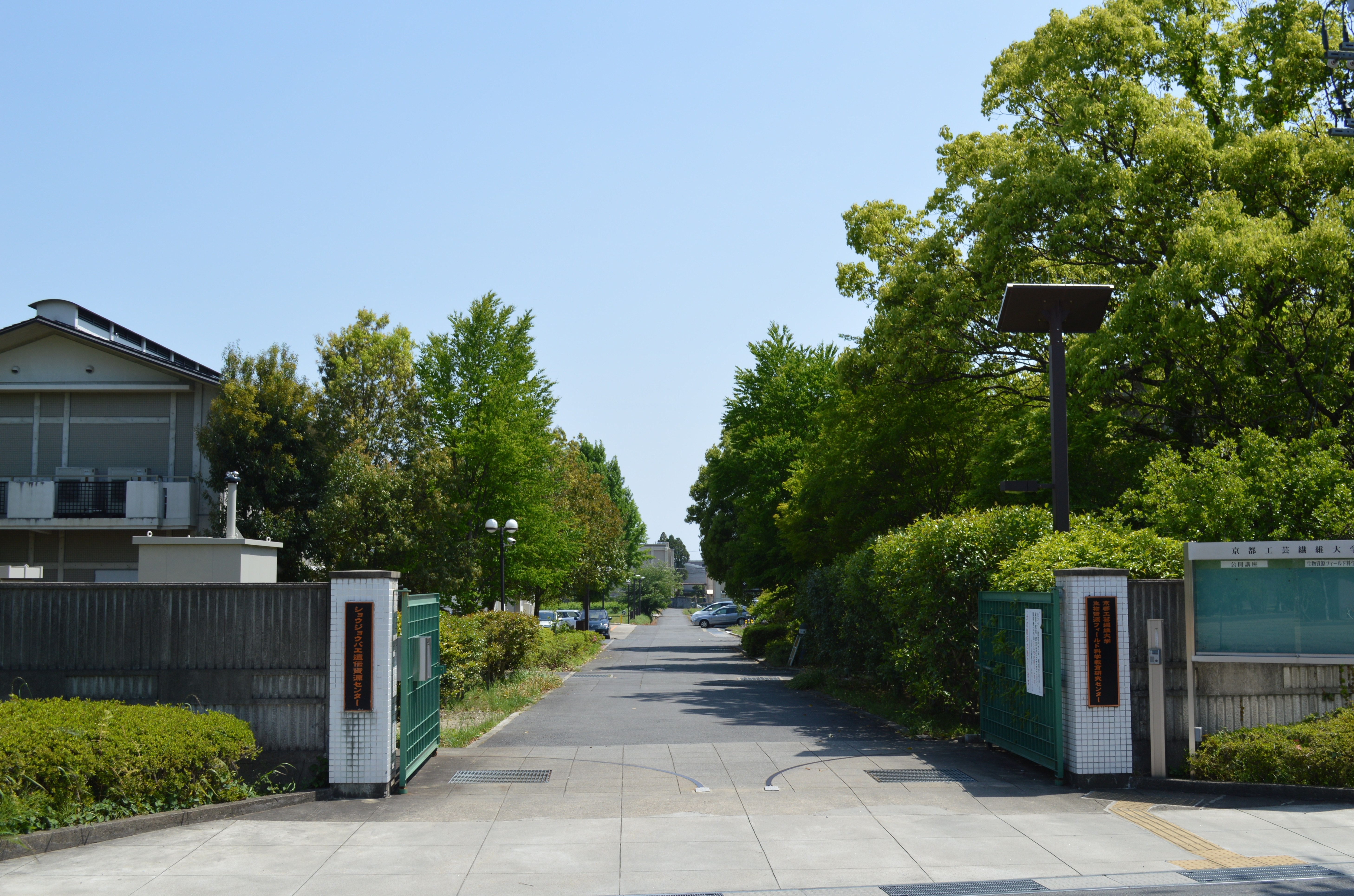 京都工芸繊維大学嵯峨キャンパスの正門から南を望む